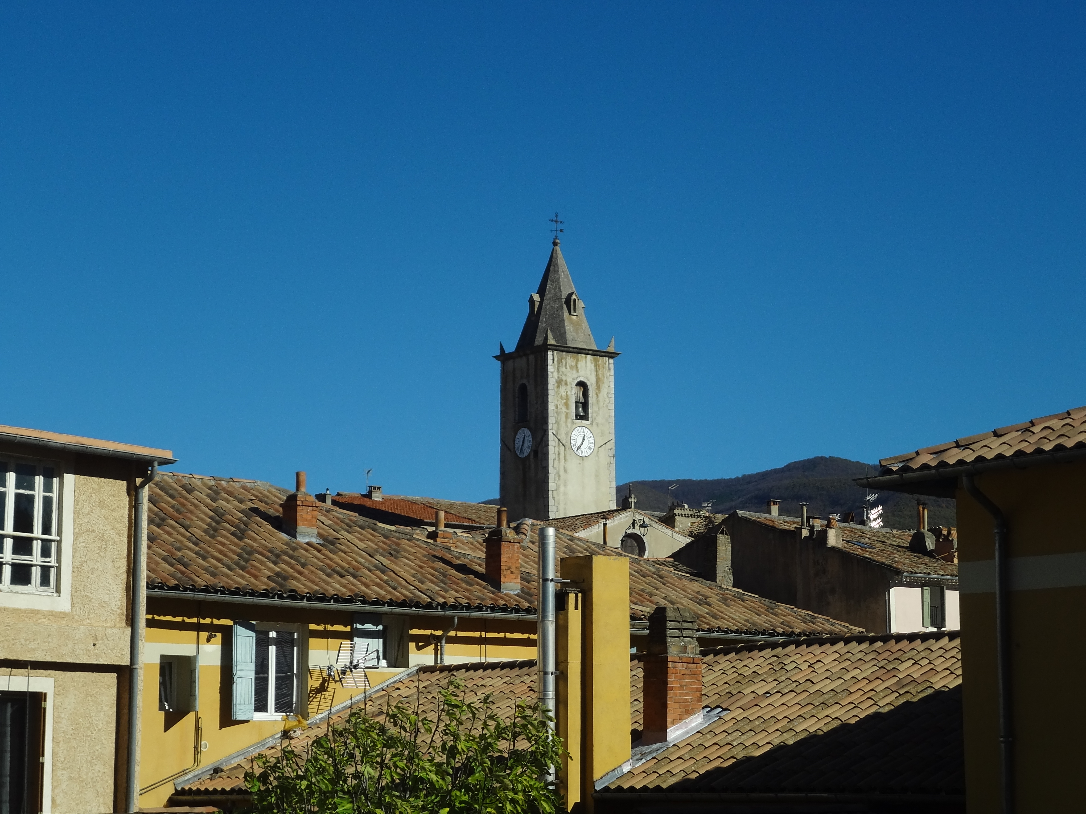 Clocher de l'église Saint-Bernard et toits du village de Château-Arnoux-Saint-Auban (04).